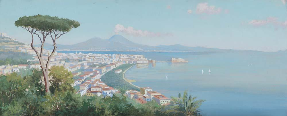 Giuseppe Chiarolanza, Vue de Naples avec le Vésuve, collection particulière.